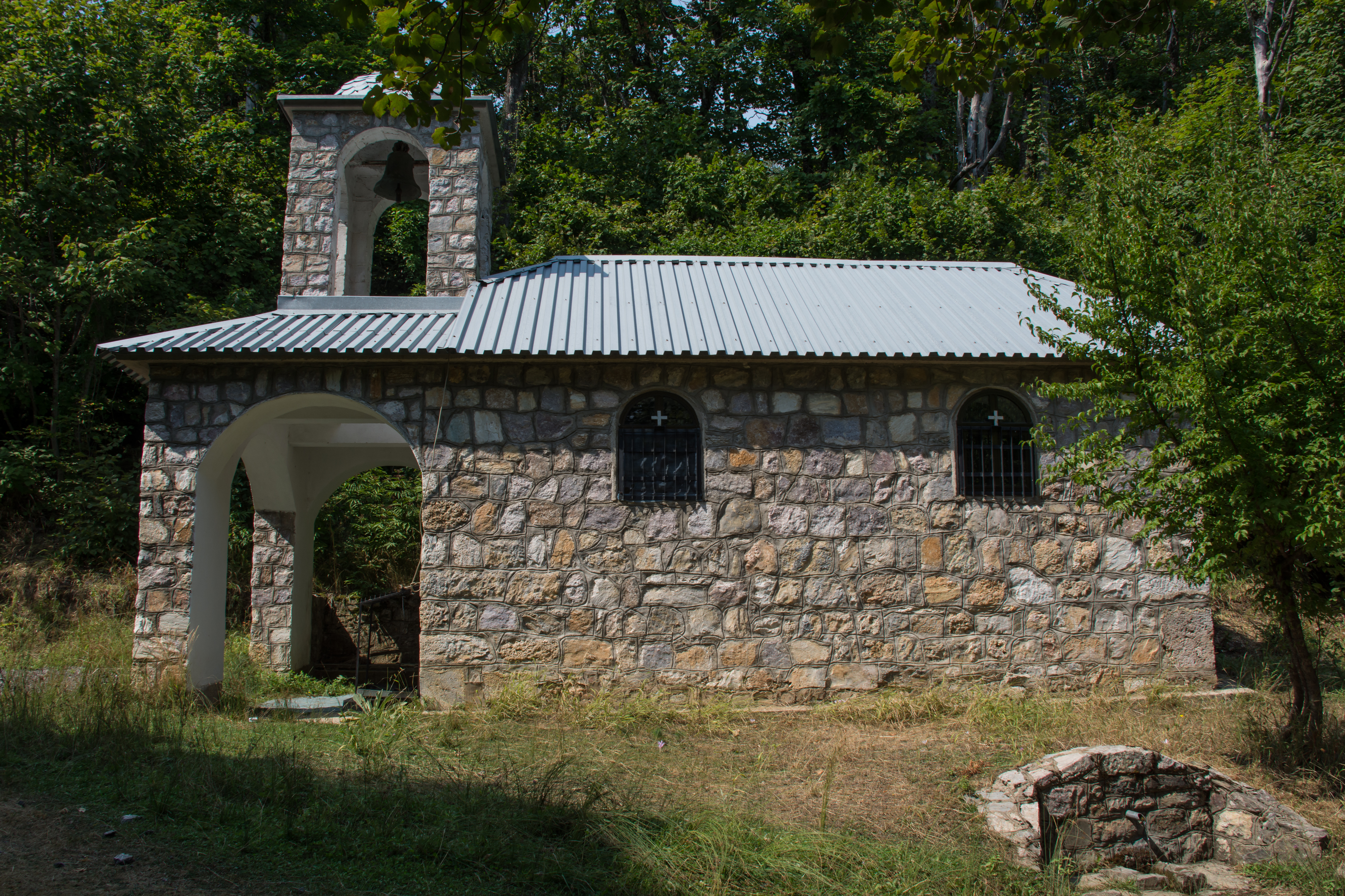 Врбенски манастир „Св. Петка“ во близина на Маврови Анови